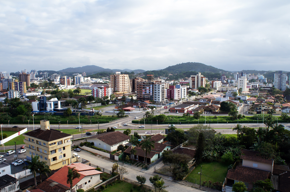 Joinville - Centro e América